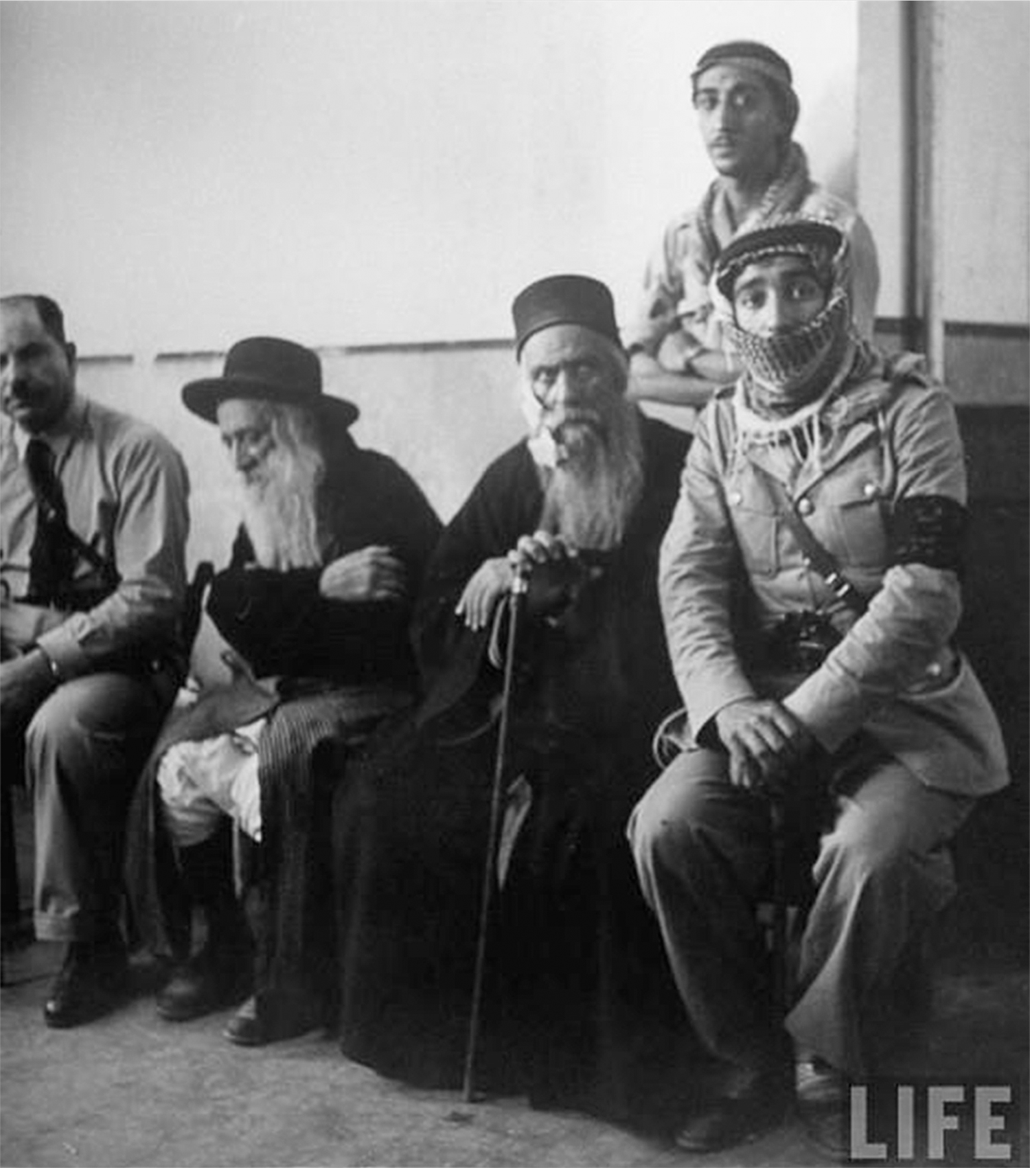 .רבני הרובע היהודי בעיר העתיקה בן ציון חזן (מימין) וזאב מינצברג לצד חיילי הלגיון הירדני בעת הסדרת תנאי הכניעה, יוני 1948. ניתן לראות את התחבושות בפניו של הרב חזן, שככל הנראה נפצע לפני כן